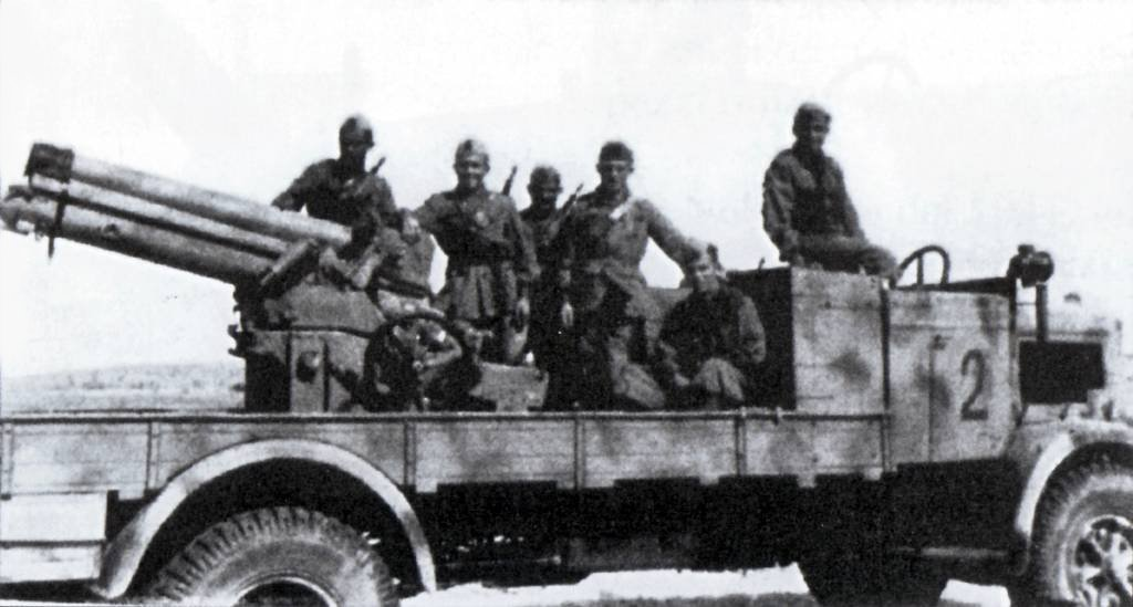 cannone 100/17 su 3ro